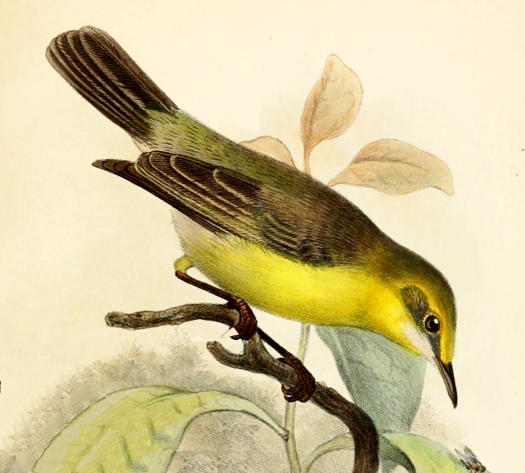 Eremomela scotops Greencap Eremomela